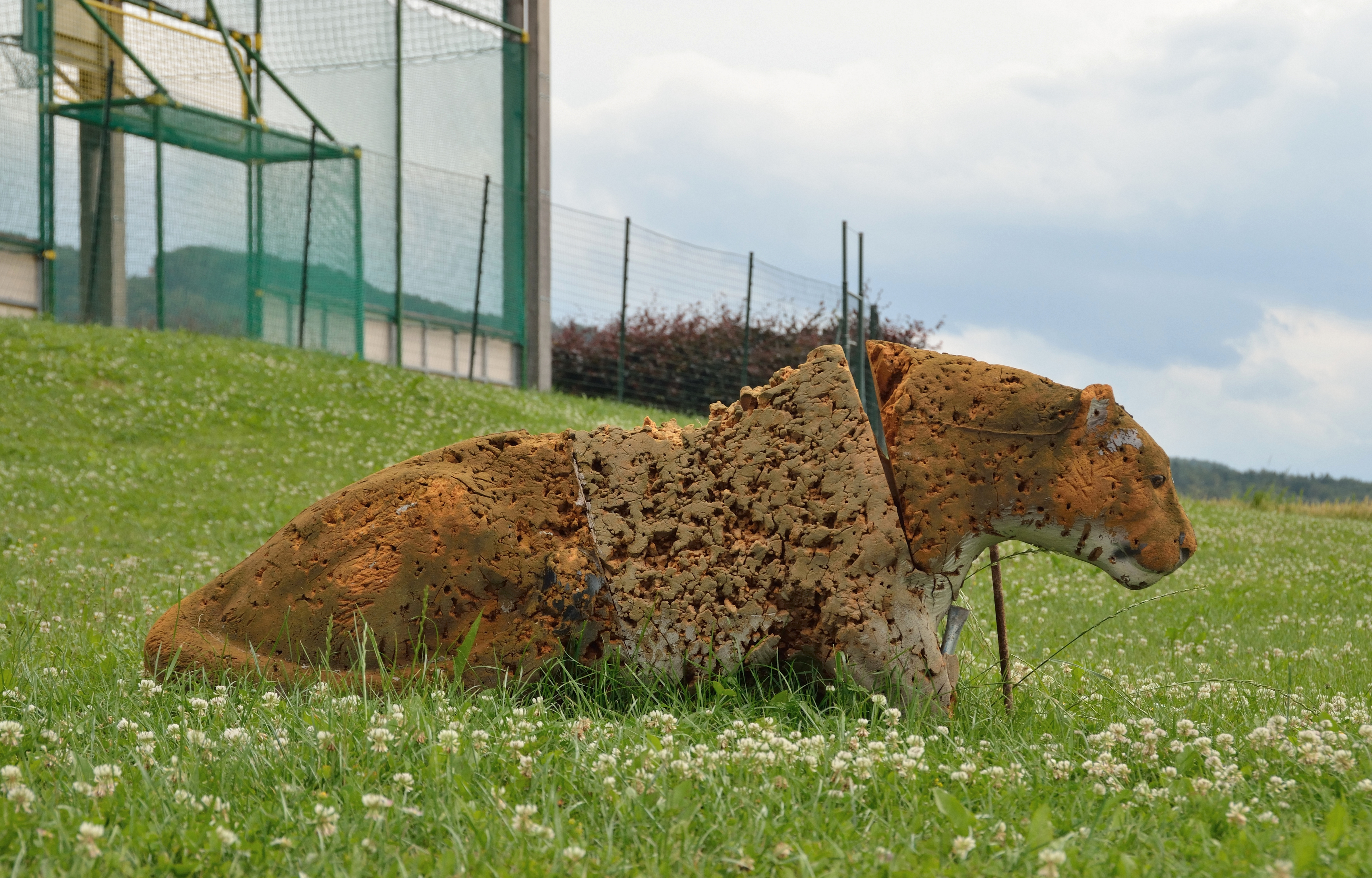 3D Bogenschützenziel in Form eines Leoparden.